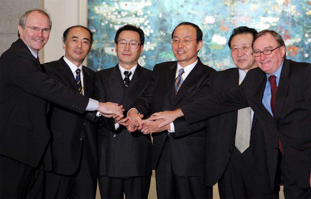 6자회담 수석대표 시절